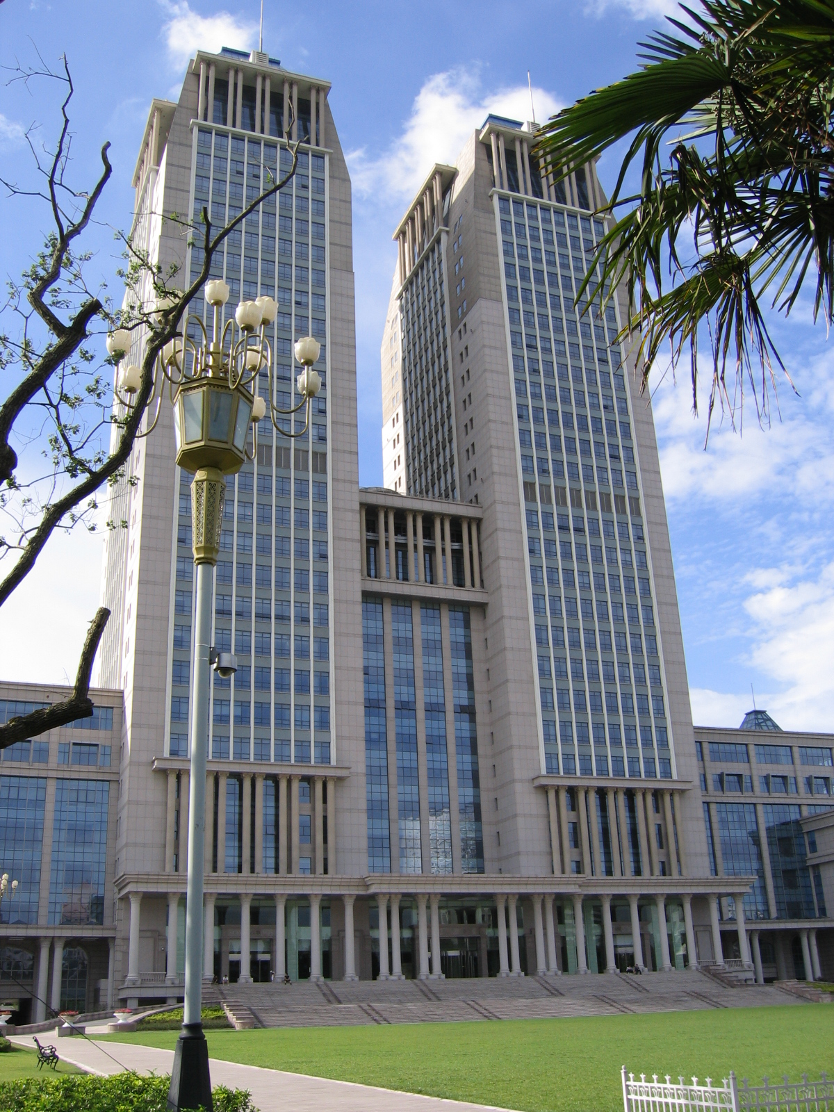 复旦大学光华楼 Guanghua Building, Fudan University, Shanghai, China